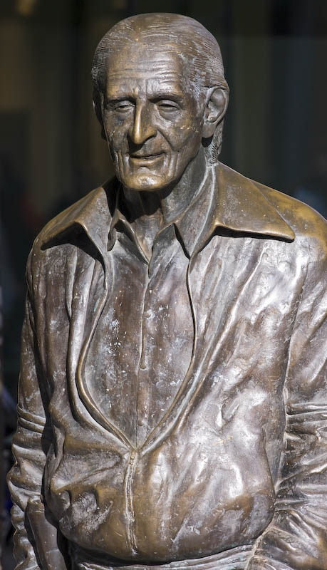 München, Denkmal für Sigi Sommer, Münchner Autor (Bronzestatue des Bildhauers Max Wagner am Roseneck in der Rosenstraße).